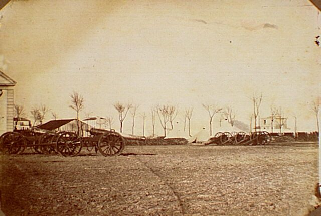 Parc Montsouris, Paris (France) en 1871, camp militaire